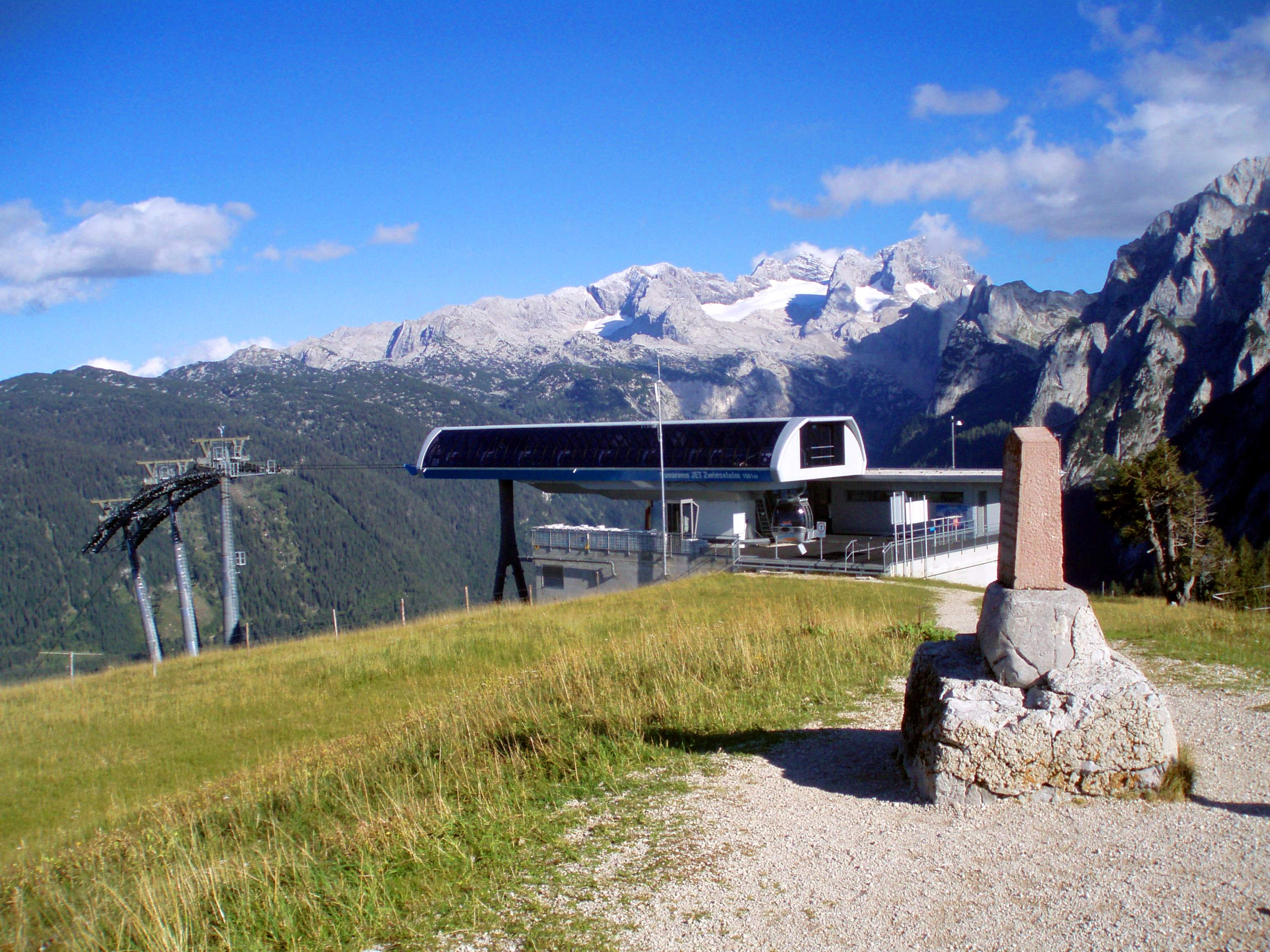 Zwieselalmhöhe mit Franz-Joseph-Gedenkstein